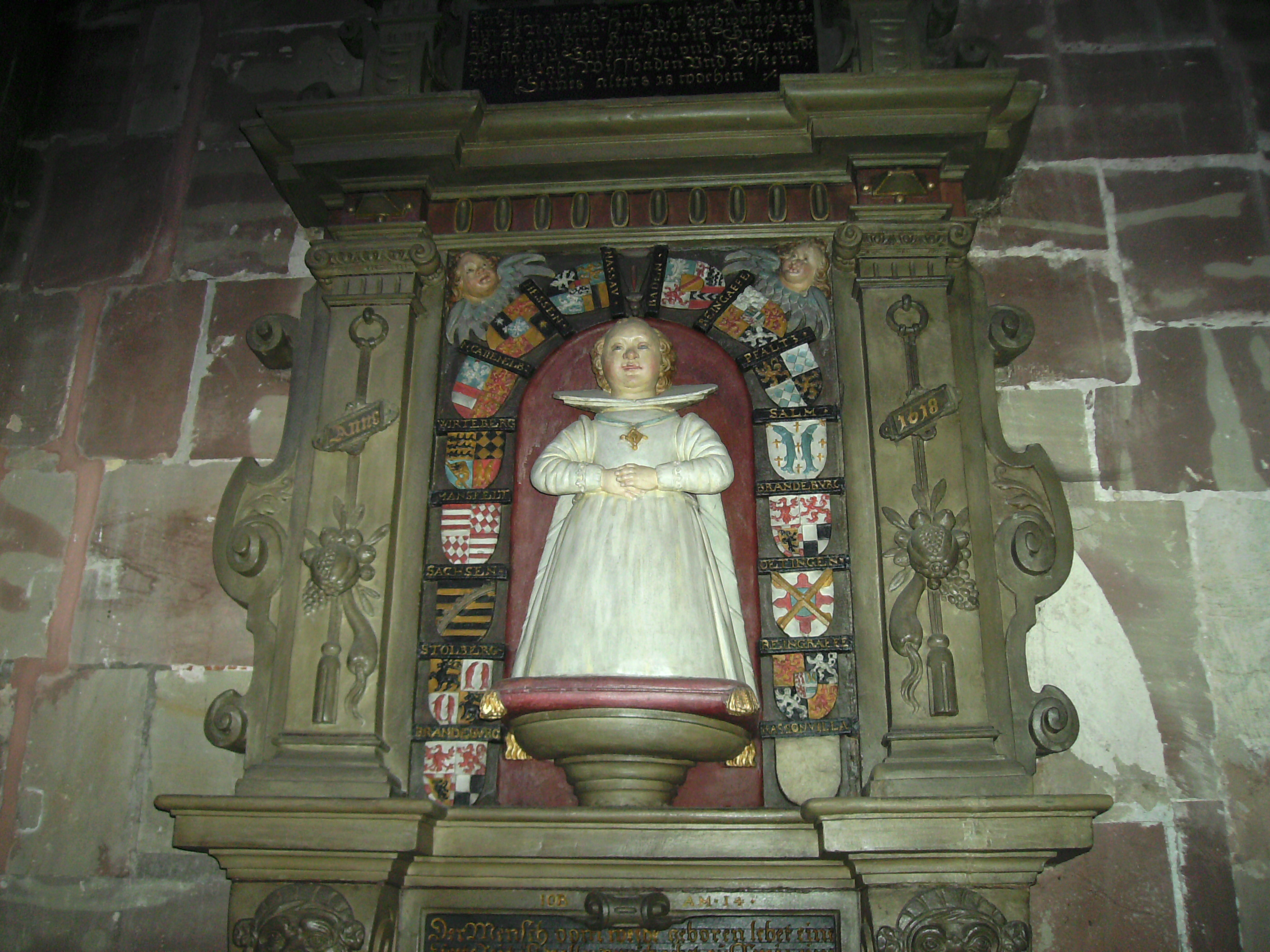 Stiftskirche St. Arnual: Grabmal des Enkelkindes Moritz (07/1618–11/1618) der Gräfin Anna Maria